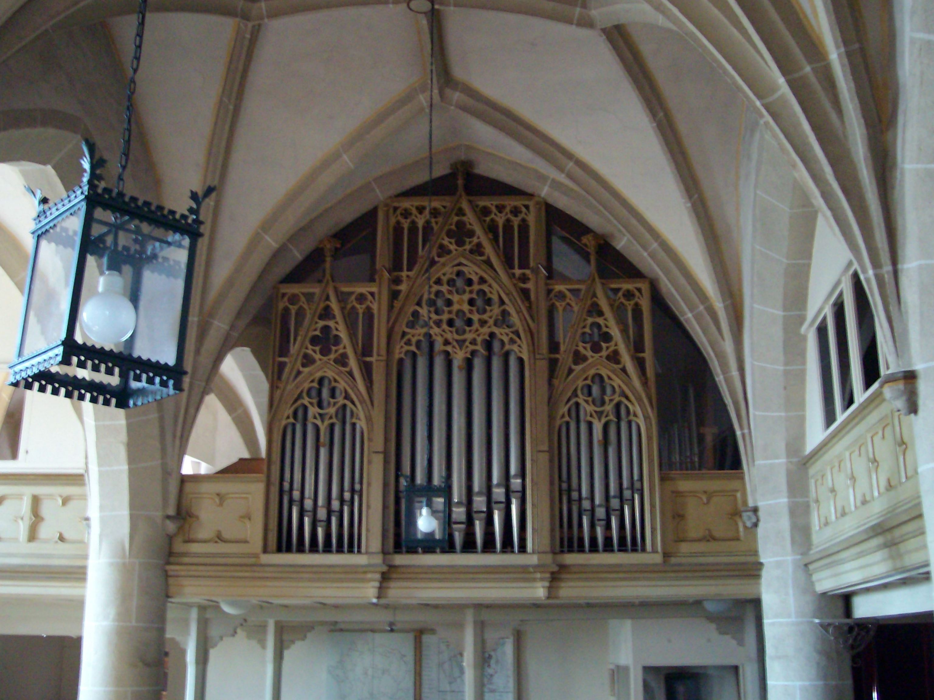 Orgel der Schlosskirche Braunfels